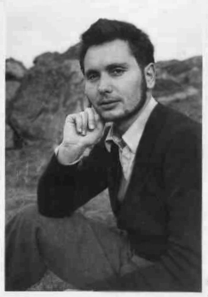 Claude Tresmontant, philosophe et théologien, dans les années 1950.